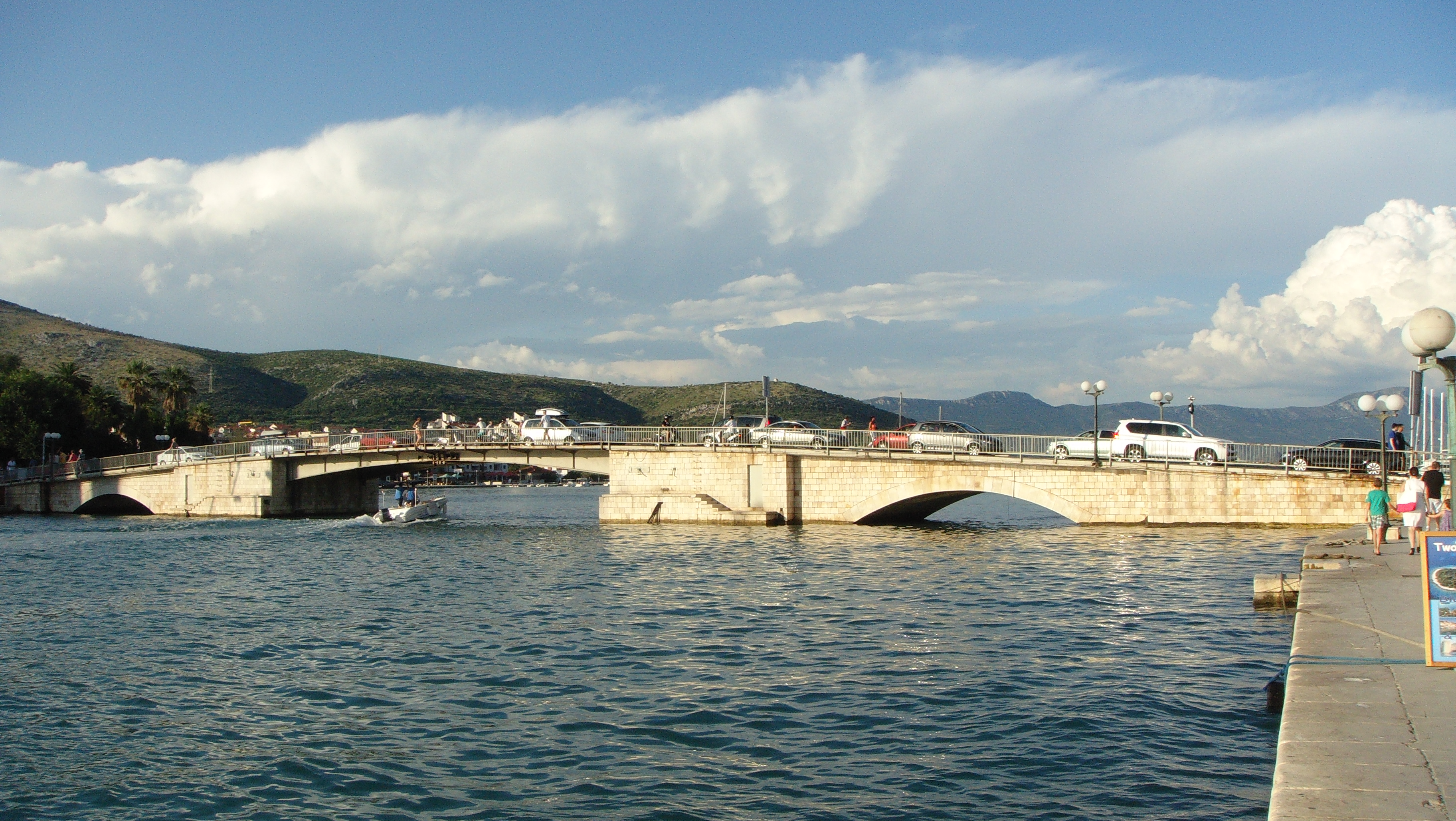 Općina Trogir, Croatia